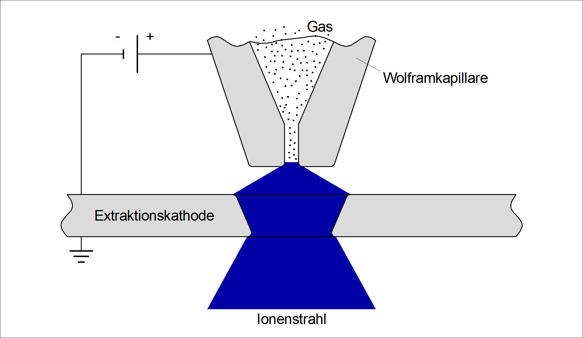 Prinzipzeichnung eines Wolframkapillaritrons